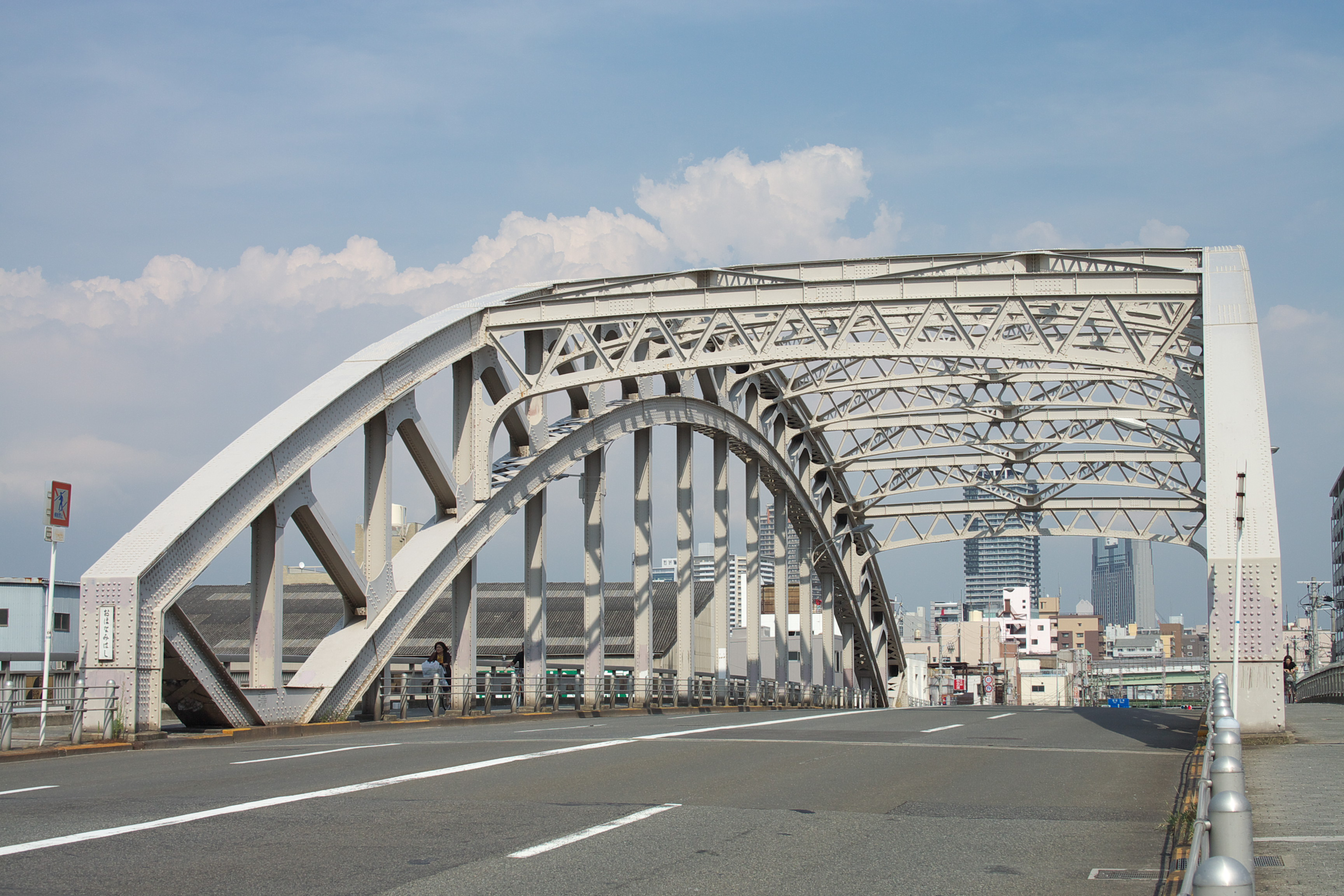 大浪橋（大阪市, 日本）